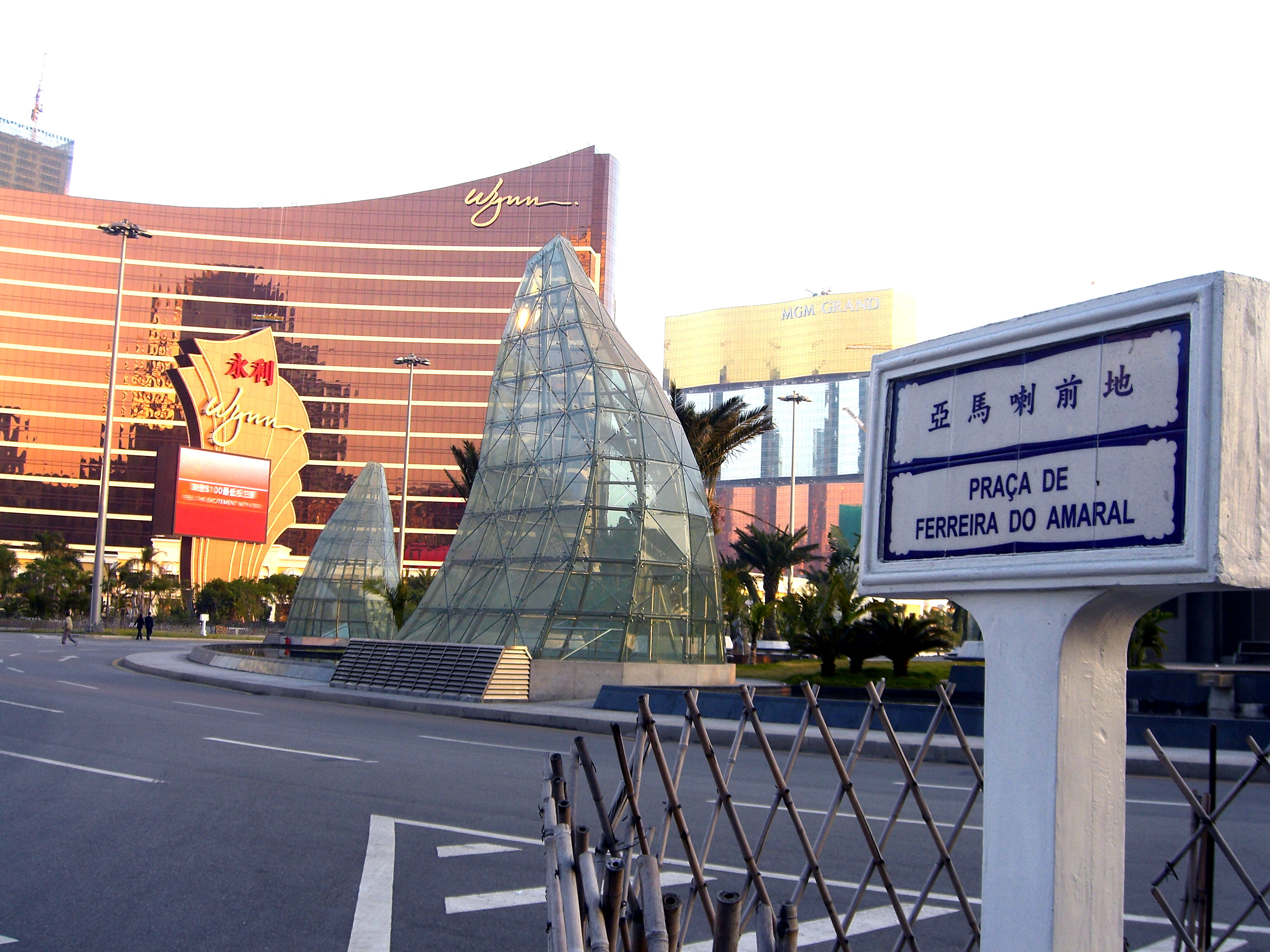 Praça de Ferreira do Amaral